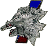 Insigne de l'escadron de chasse 3/3 "Ardennes"